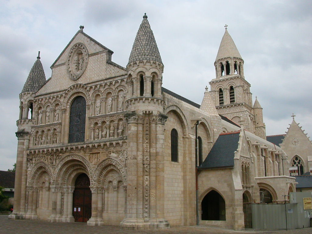 Église Notre-Dame la Grande, Poiters, Poitou, FranceBrezhoneg: Iliz Itron Varia Vraz, Poitiers, Poetou, Bro C'Hall .